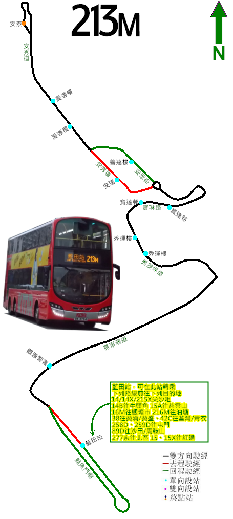 中文（香港）: 九巴213M線的走線圖